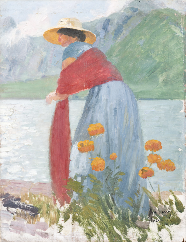 Femme au châle rouge au bord du lac